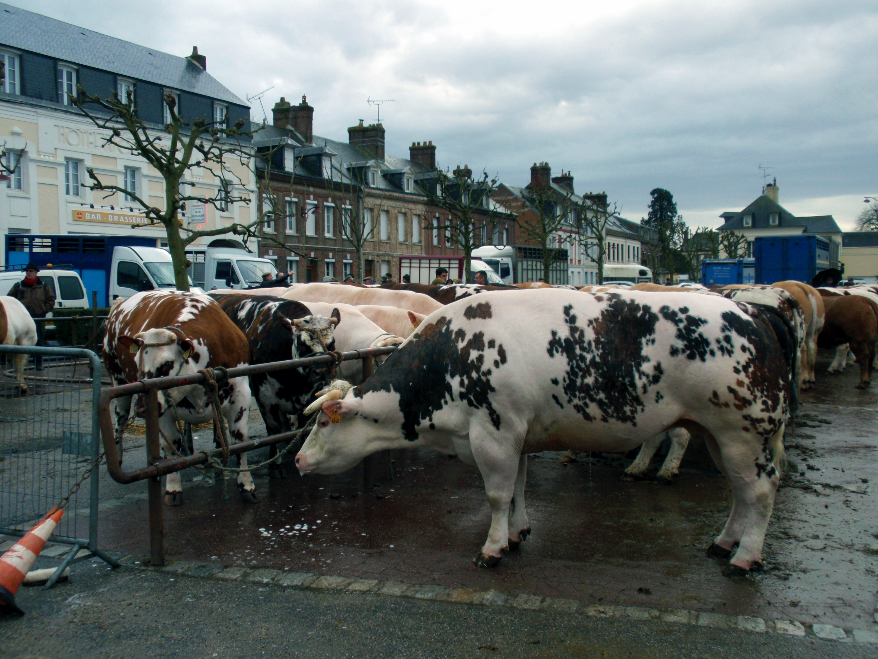 Fauville-en-Caux (Seine-Maritime, France). Concours d'animaux de boucherie.